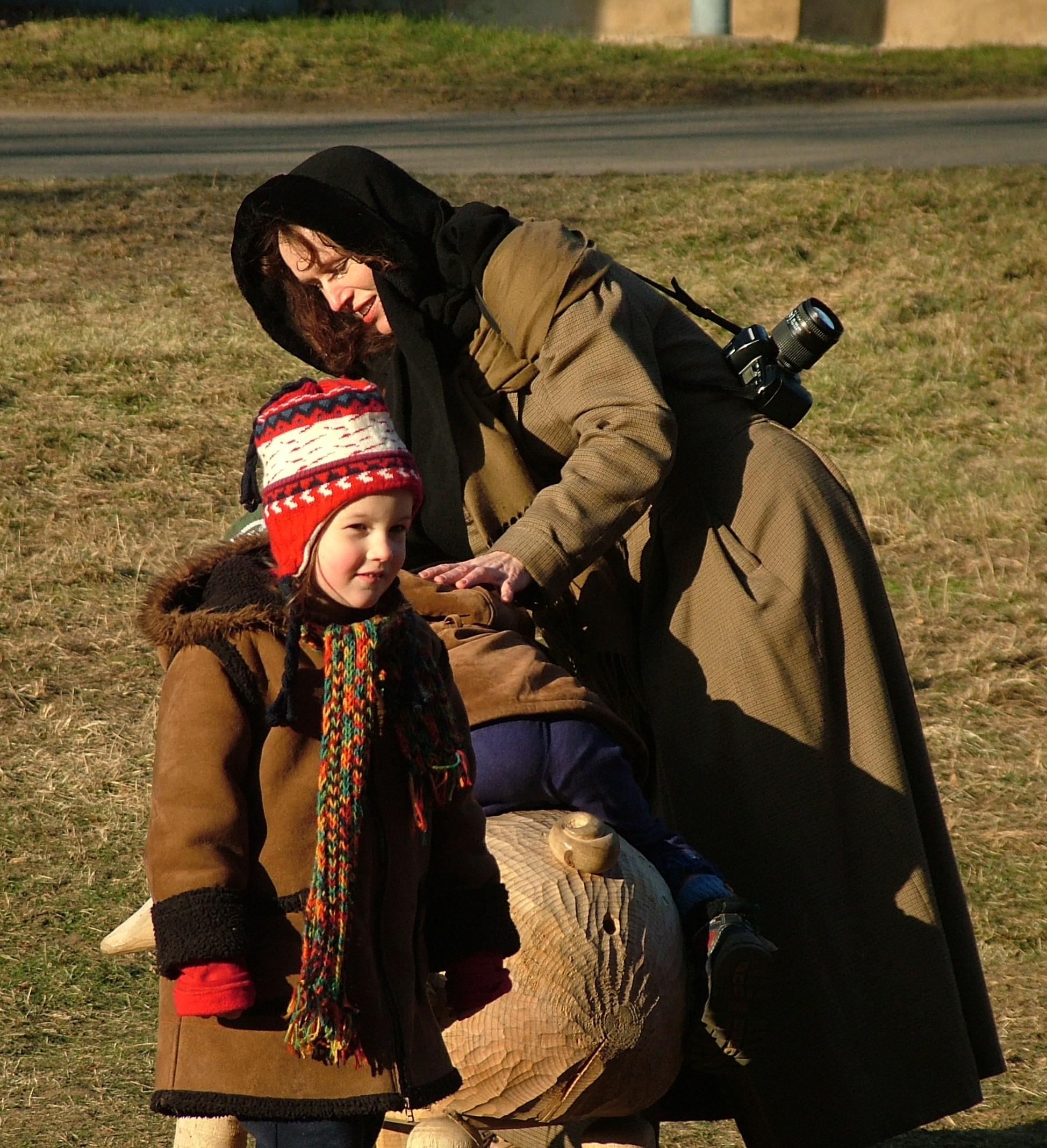 Sára Saudková fotografuje deti